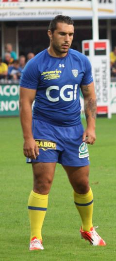 Ludovic Radosavljevic pénalité